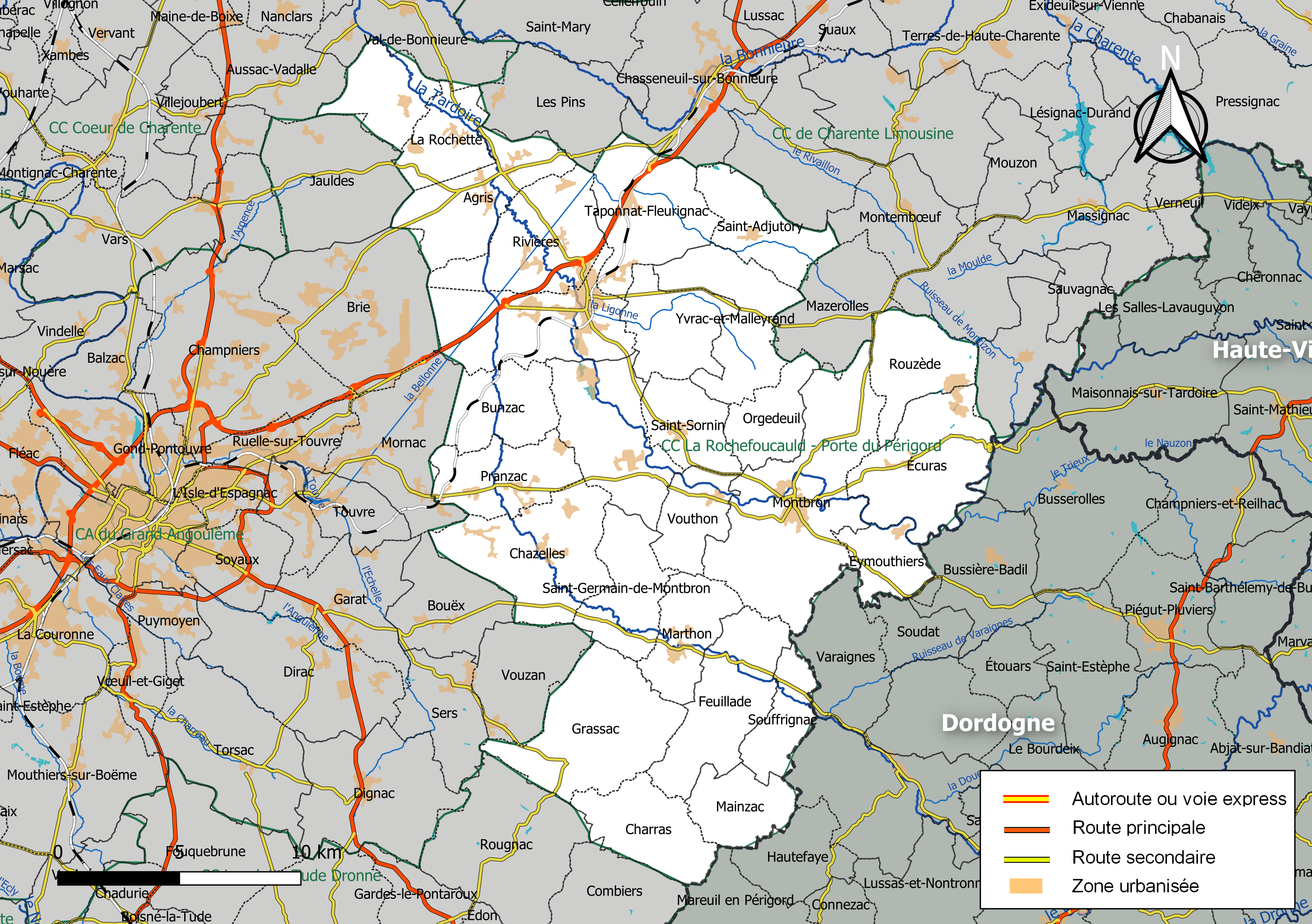 Carte géographique de la Communauté de communes La Rochefoucauld - Porte du Périgord, département de Maine-et-Loir, France. Composition au 1er janvier 2019.